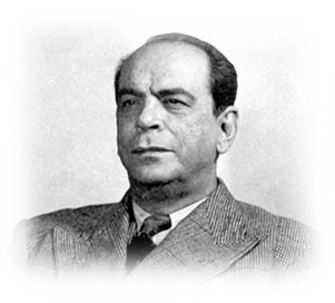 Rómulo Gallegos